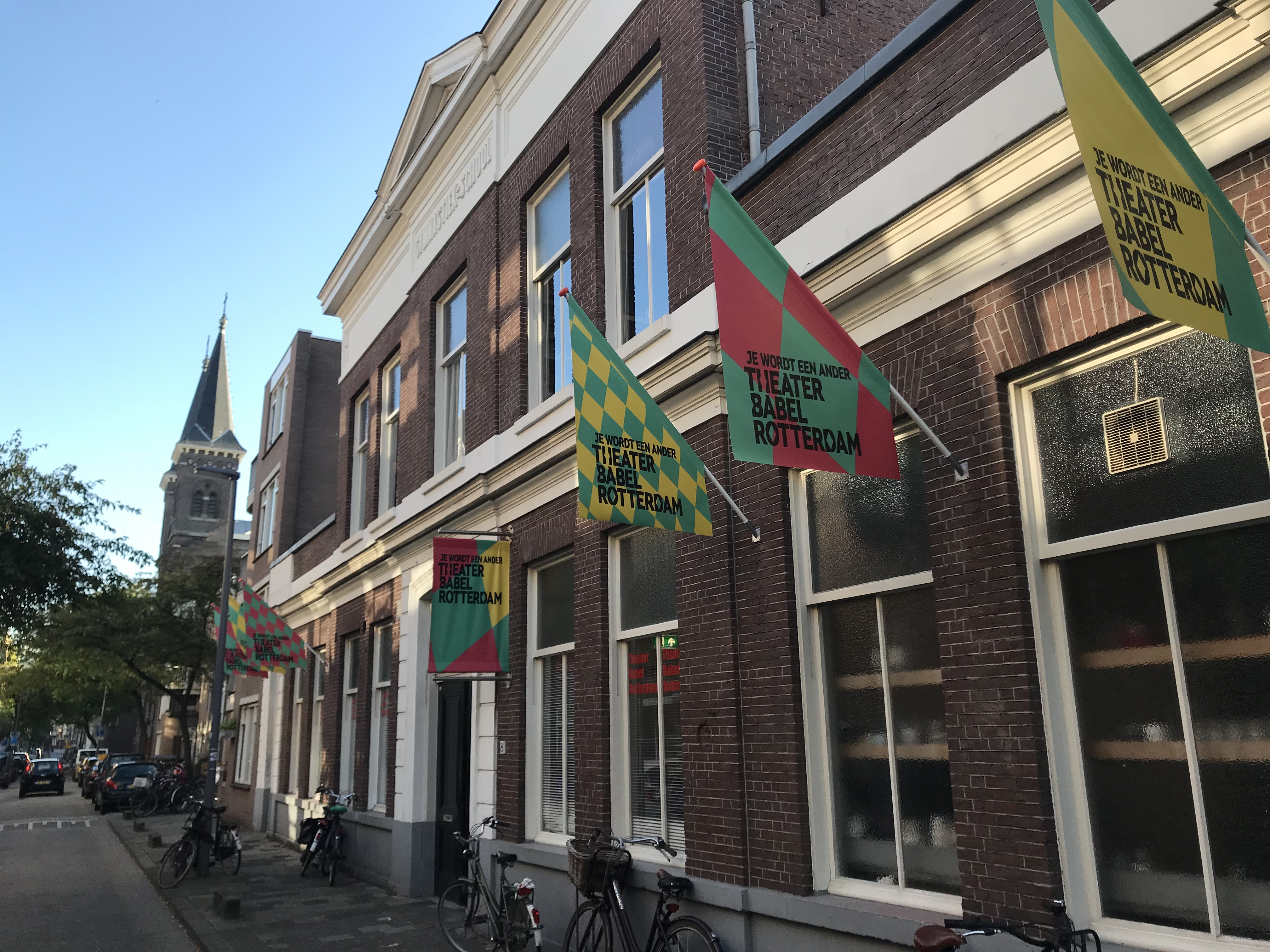 De nieuwe locatie van Theater Babel Rotterdam vanaf 2018 ; het voormalig Theater Bonheur.